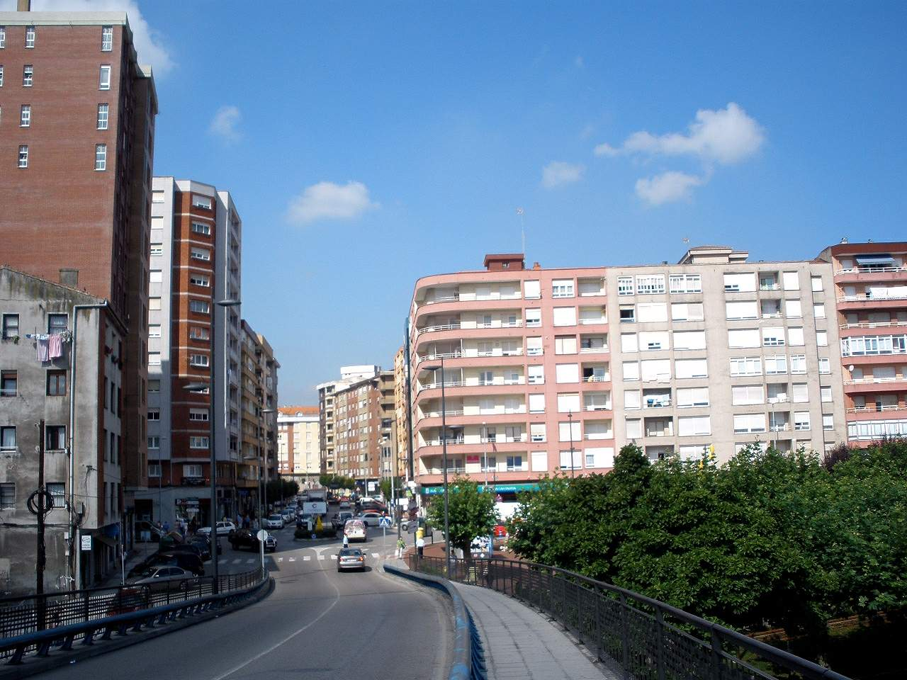 Muriedas (Camargo, Cantabria)